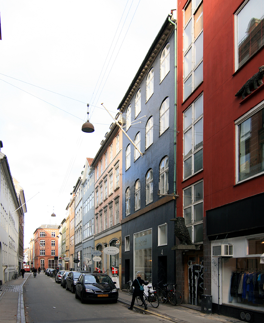 Klareboderne, København. Set mod nordøst.